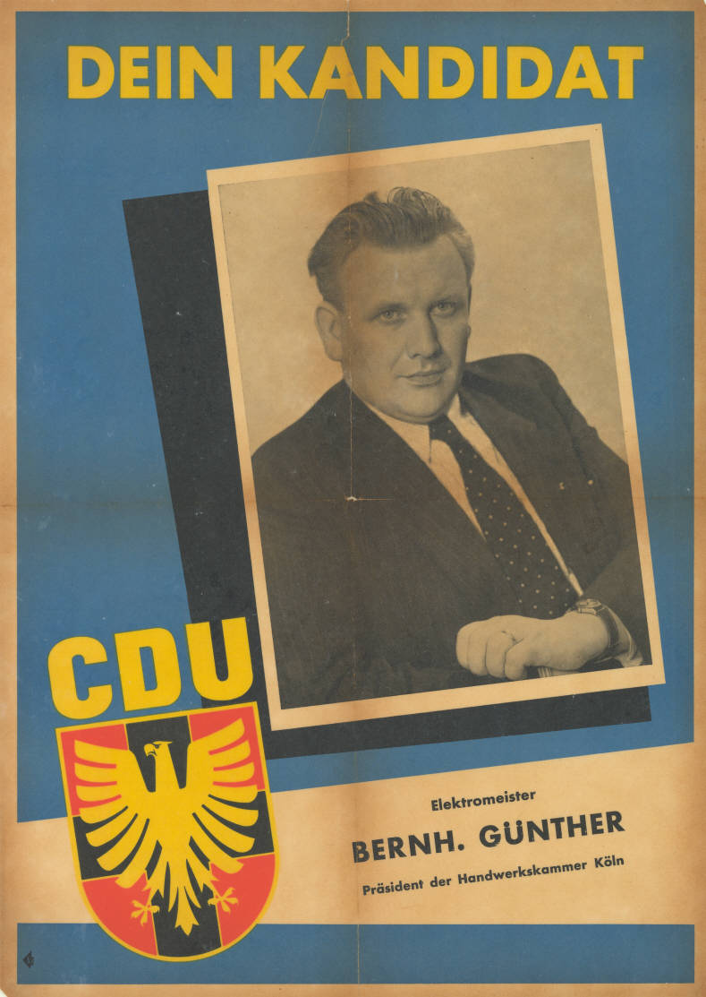 Dein Kandidat CDU Elektromeister Bernh. Günther Präsident der Handwerkskammer Köln Abbildung: Foto - CDU-Logo Plakatart: Kandidaten-/Personenplakat mit Porträt Objekt-Signatur: 10-009 : 331 Bestand: Landtagswahlplakate Nordrhein-Westfalen (10-009) GliederungBestand10-18: Landtagswahlplakate Nordrhein-Westfalen (10-009) » Landtagswahl am 27.6.1954 » CDU » mit Porträt-Foto Lizenz: KAS/ACDP 10-009 : 331 CC-BY-SA 3.0 DE